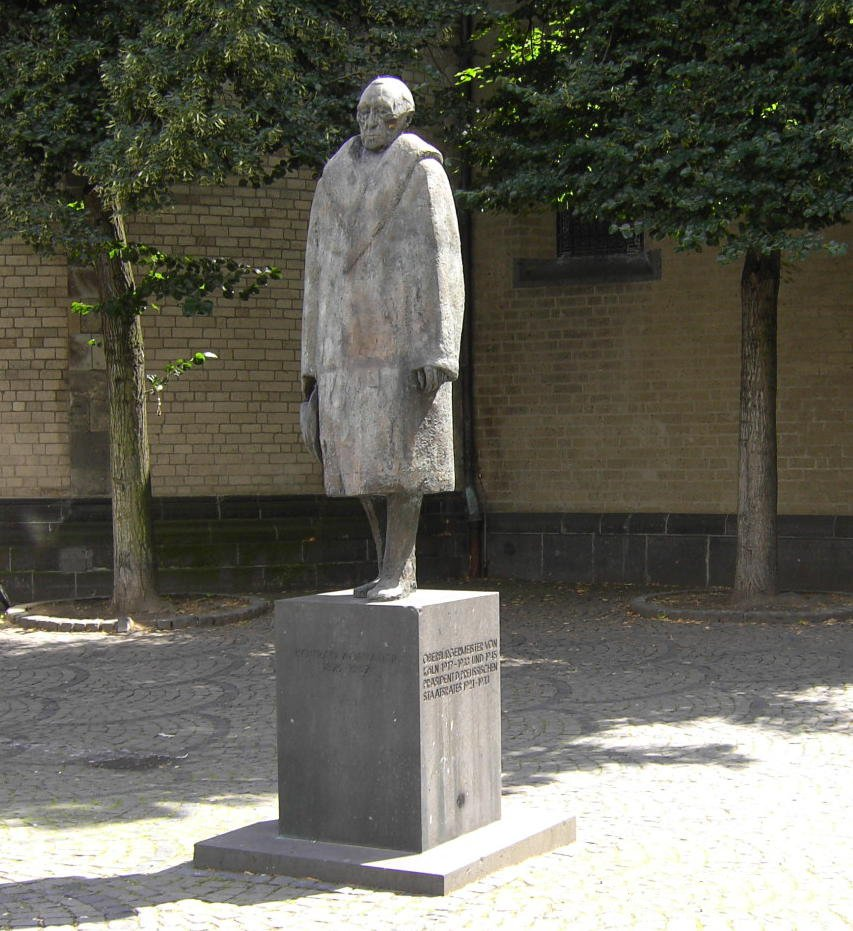 Denkmal für Konrad Adenauer an der St. Apostelnkirche in Köln